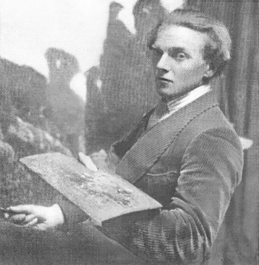 Portrait des Malers Philippe Robert